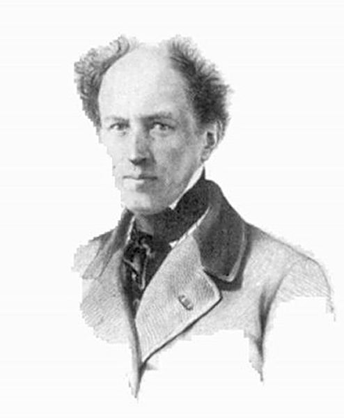 Portret van J.F.H.J.E. Mackay 1807-1846